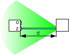 Lidar afstandsmeting